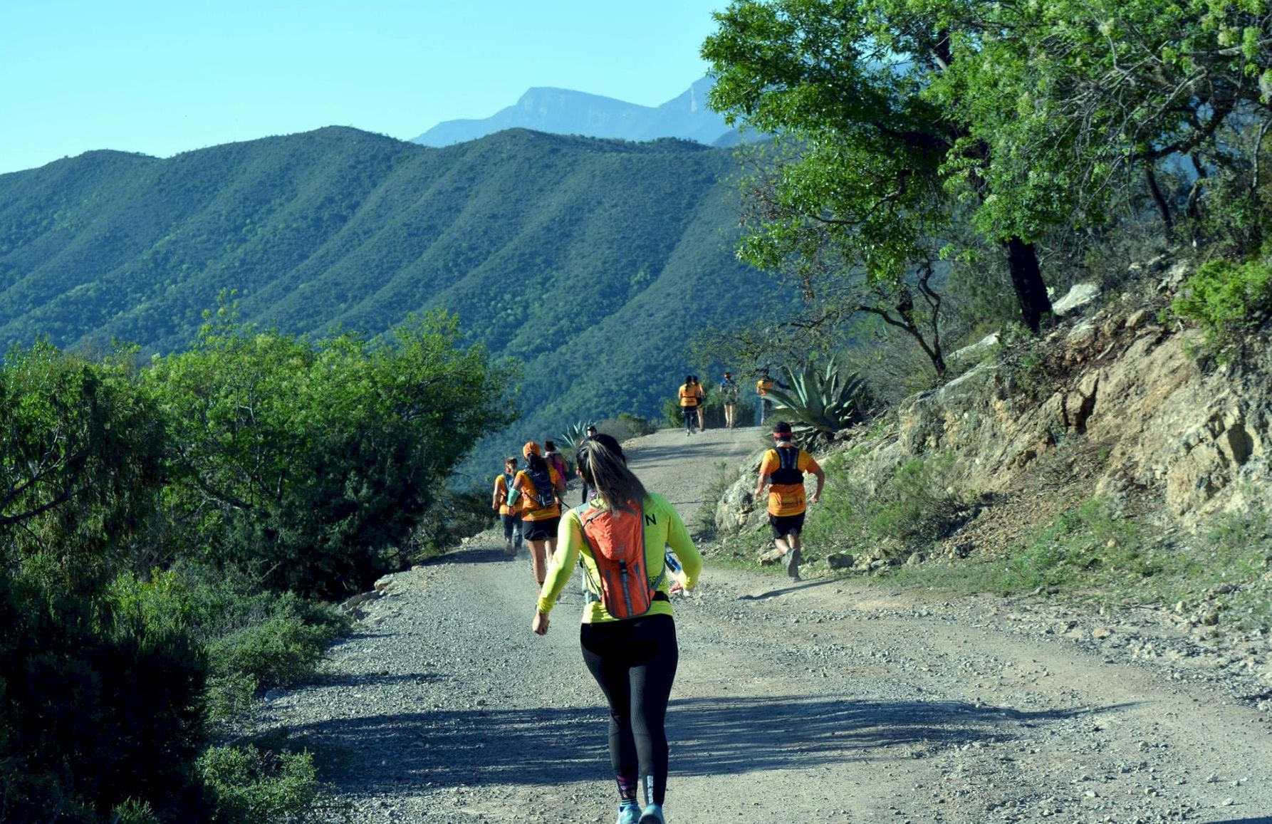 carrera de ultrafondo por montaña: Ultra City-Trail Iturbide (UTI)